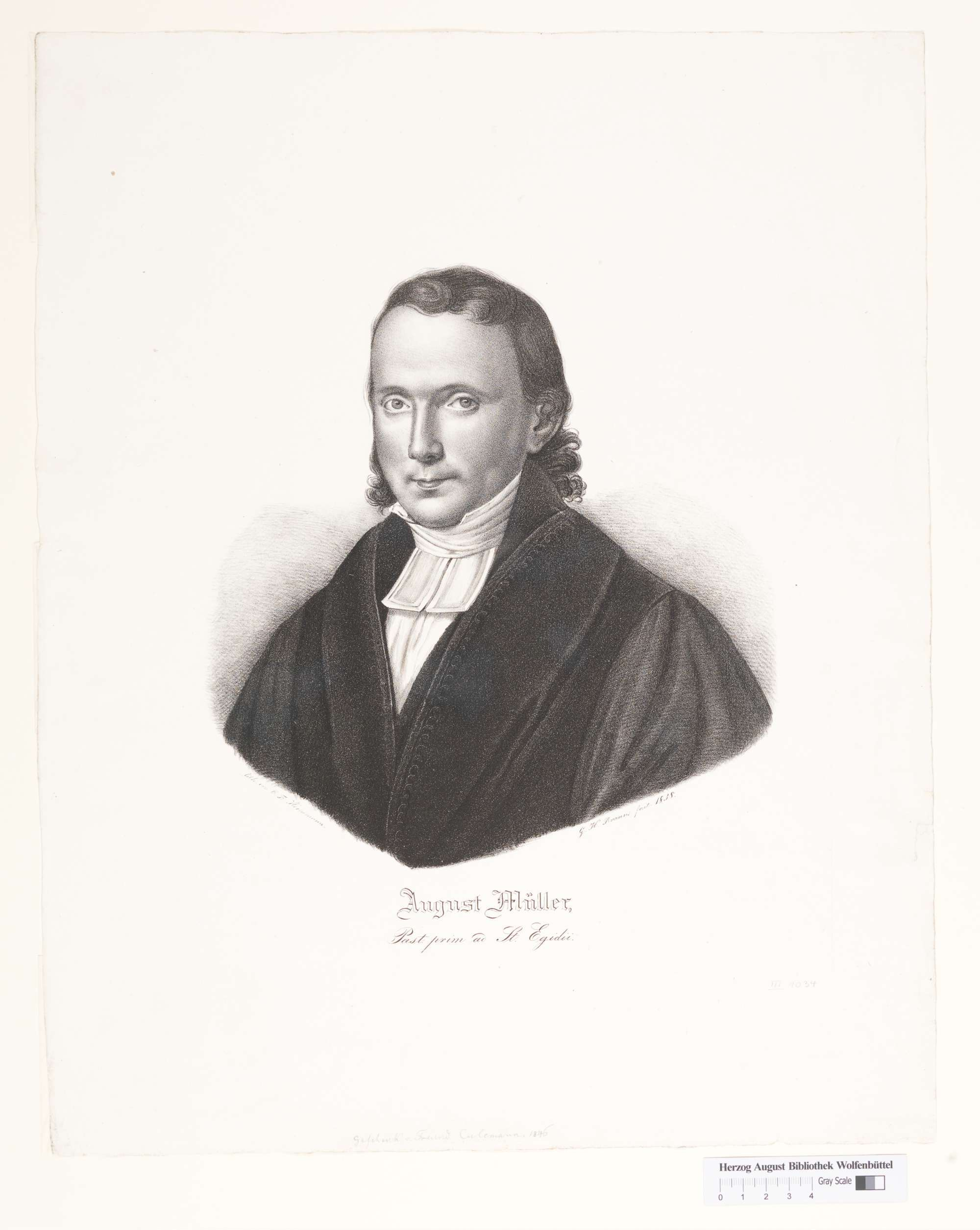 Von dem Maler und Zeichenlehrer Georg Heinrich Brauns signierte und 1838 datierte Lithographie mit einem Brustbild des Pastors und Schulinspektors August Müller (1799–1872). Das Blatt hat die Maße circa 485 x 387 mm ...